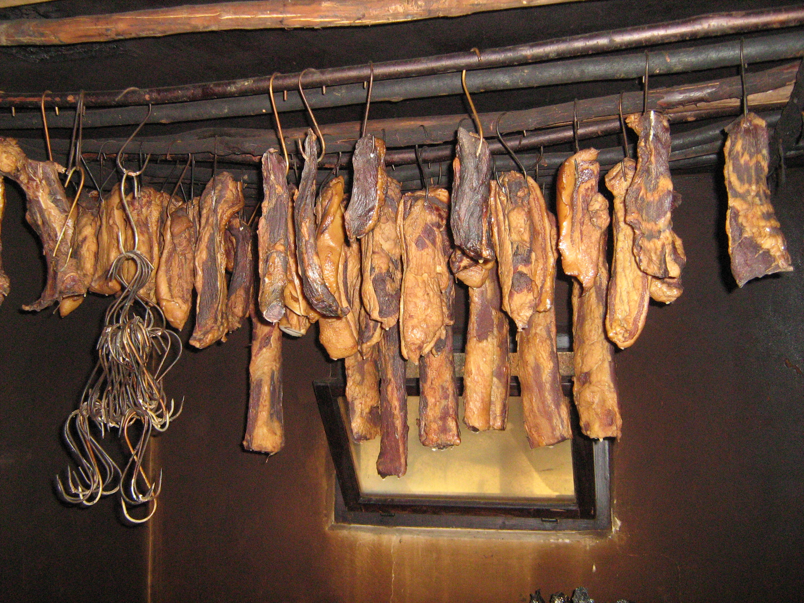 Dimljena pršuta, selo Šarani, Gornji Milanovac.